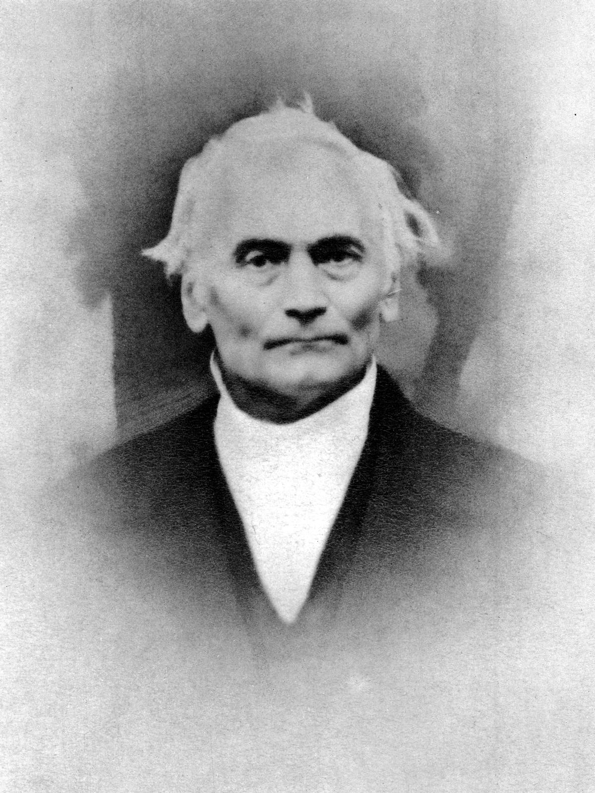 Jan Evangelista Purkyně (1787–1869); Foto um 1860